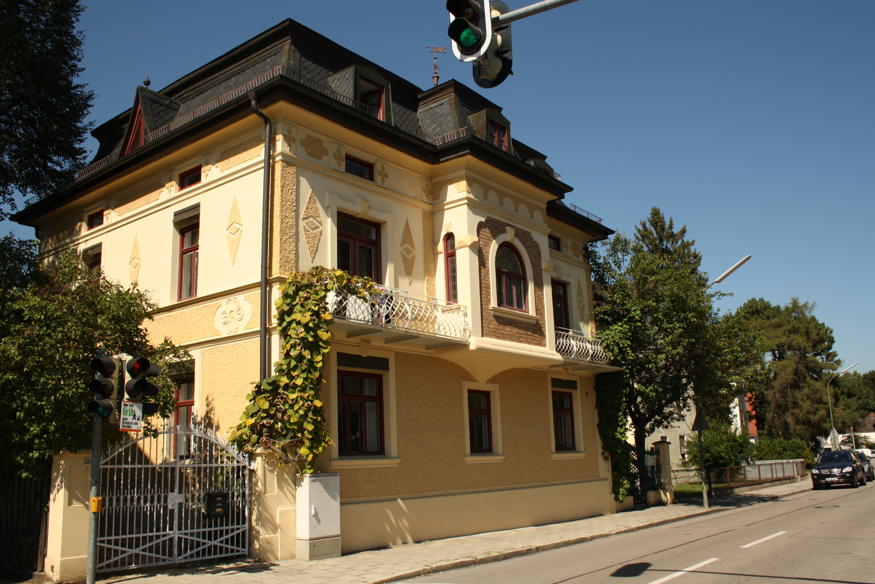 Ein Wohnhaus in der Planegger Bräuhausstr. 13